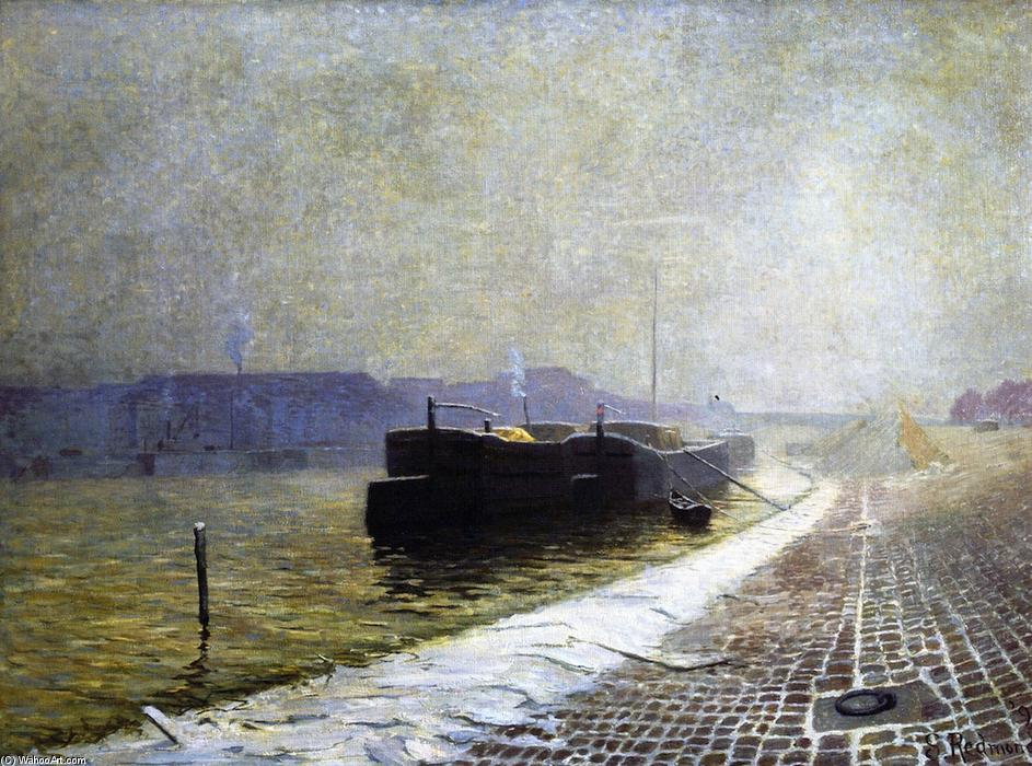 Granville Redmond a peint ce tableau. Et ce tableau est presenté au salon de Paris.